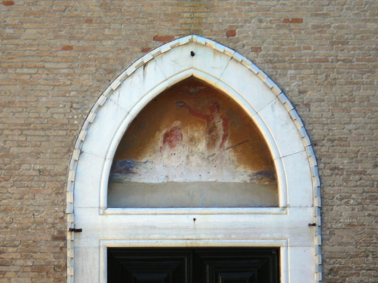 Venezia, particolare del portale centrale di San Giovanni in Bragora The Baptism of Christ